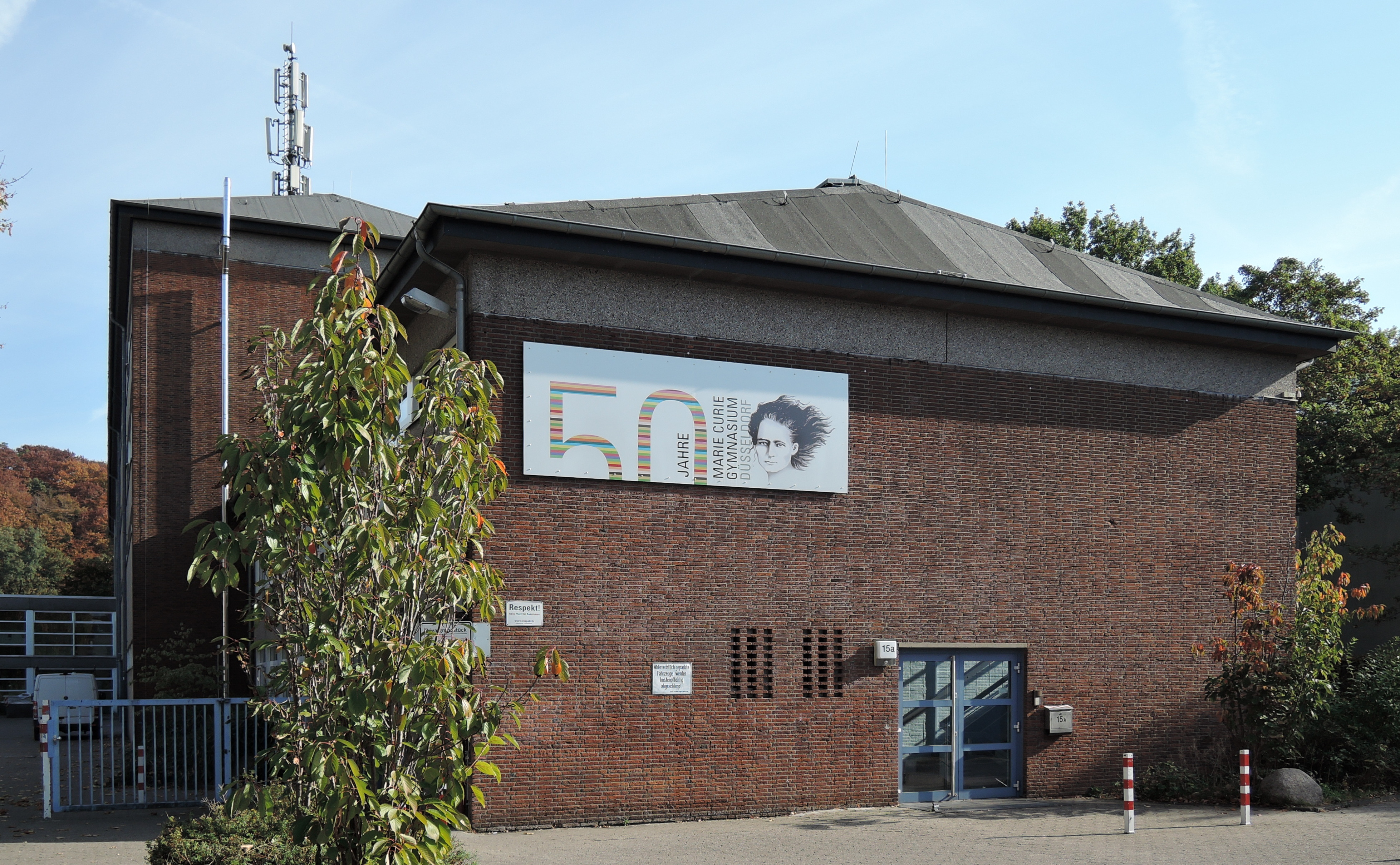 Marie-Curie-Gymnasium Gerresheim